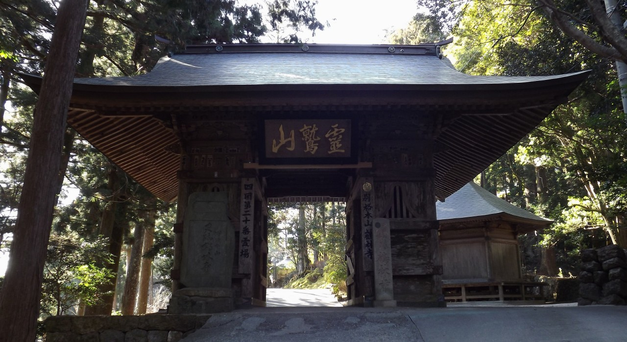 鶴林寺の仁王門